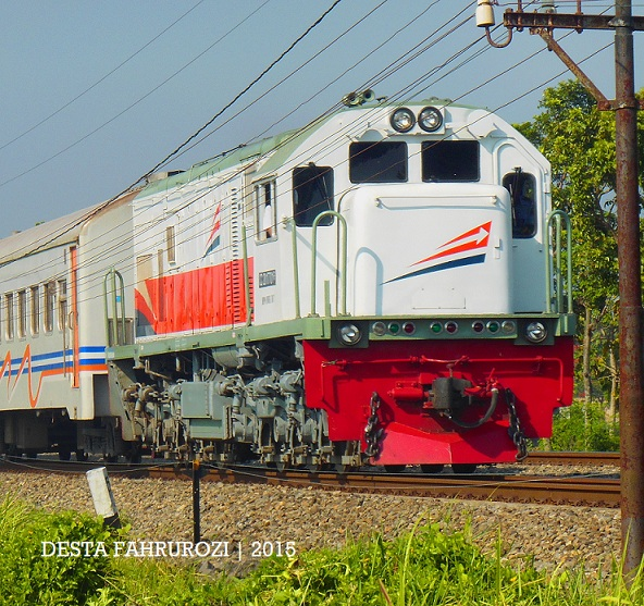 Lokomotif CC 201 77 01R berdinas KA Sri Tanjung dengan chowcather barunya